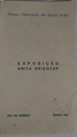 Anita Orientar Exposição Museu Nacional de Belas Artes 1942 Catalogo title